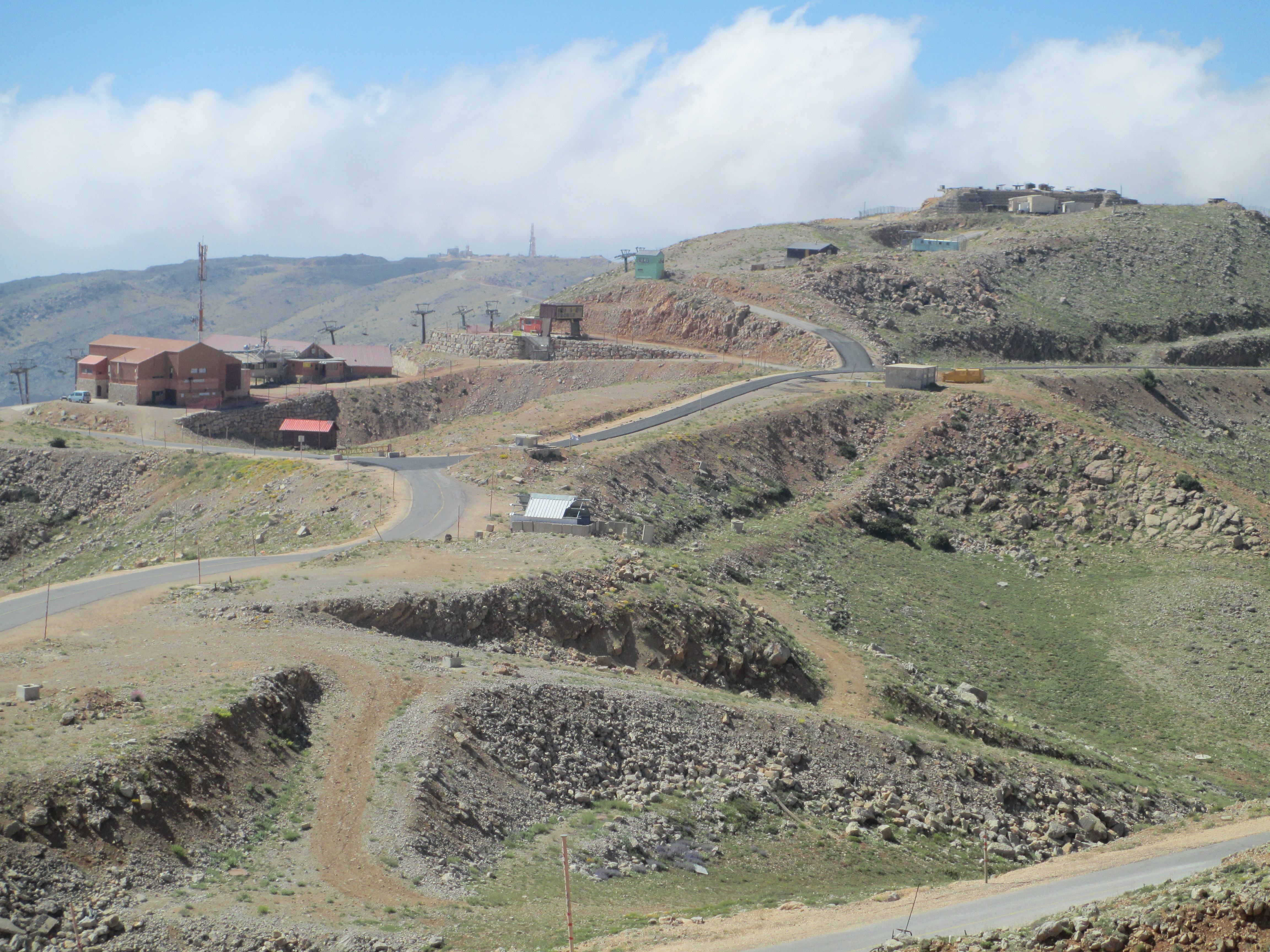 Bergstation des Hermon ski resorts auf rund 2000 m